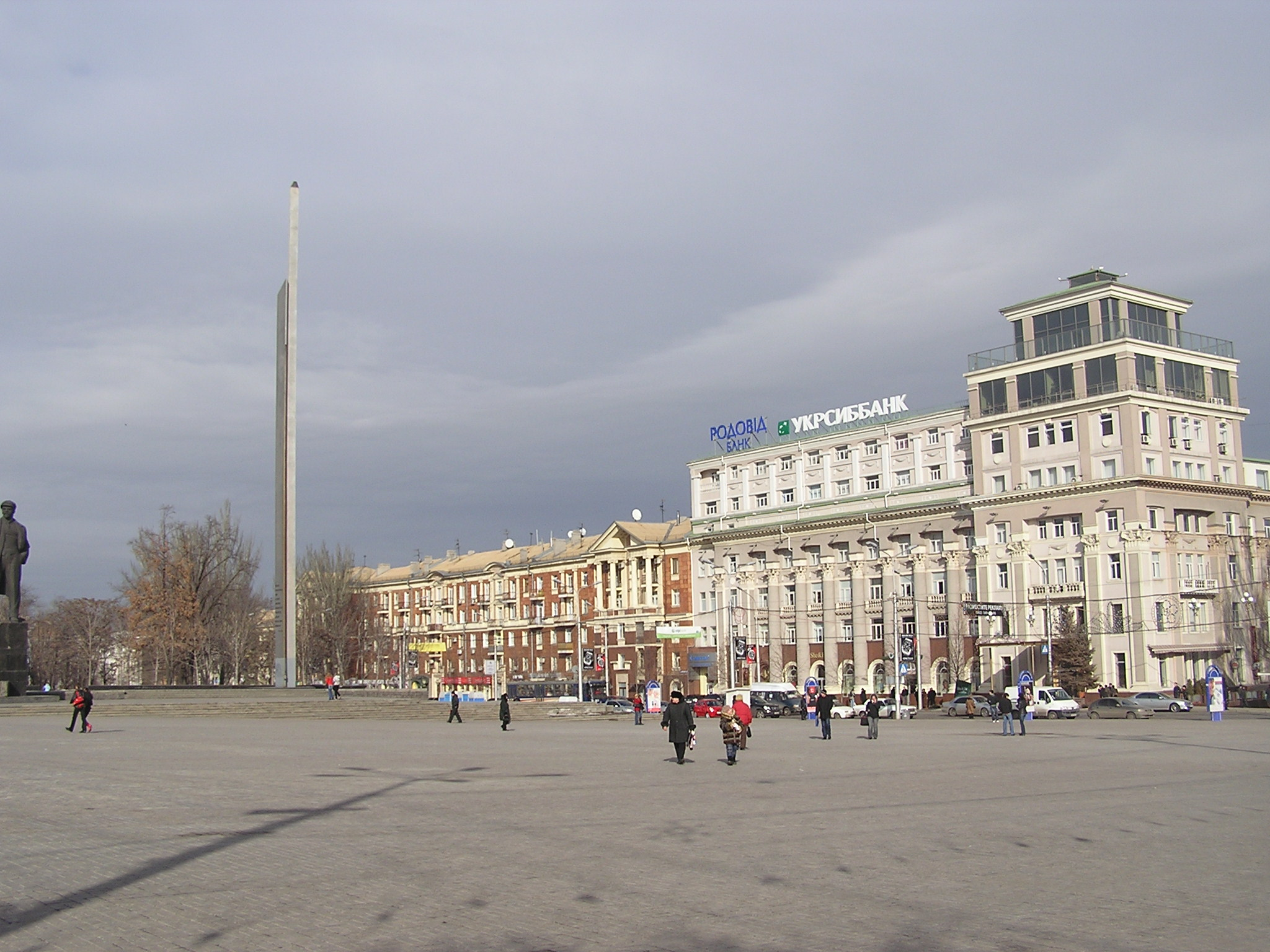 Донецк. Площадь Ленина